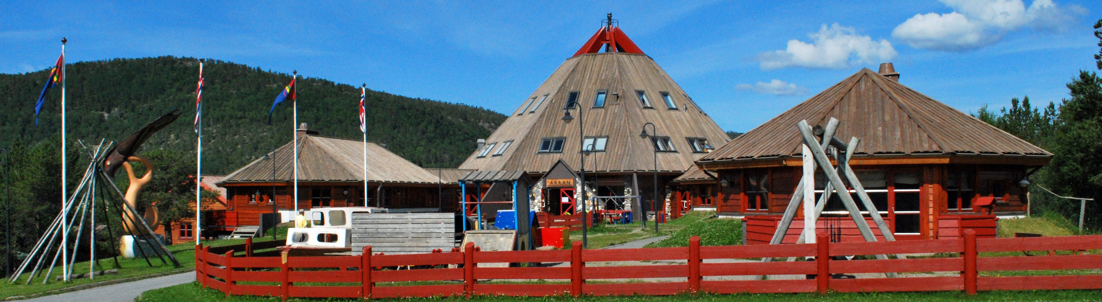 Árran, julevsáme guovdásj/lulesamisk kultursenter, Drag, Tysfjord kommune